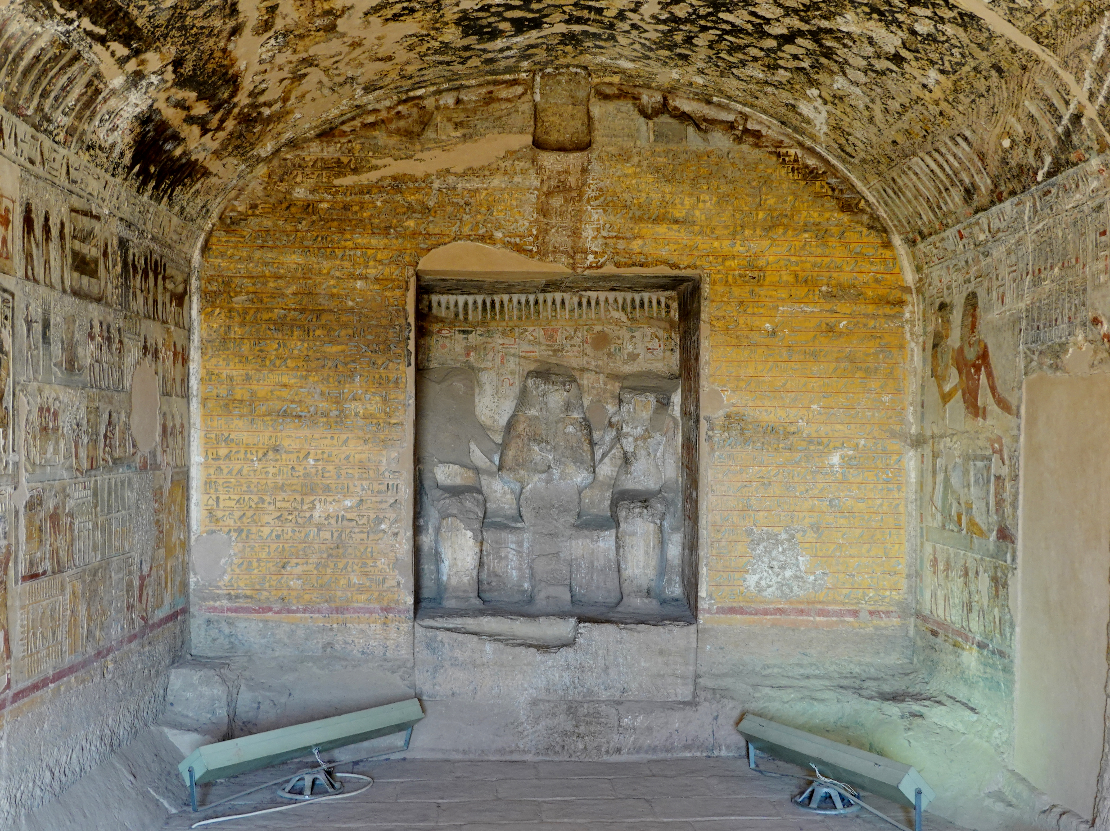 Felsengrab des Paheri unter den Felsengräbern des altägyptischen Necheb bei el-Kab, Ägypten